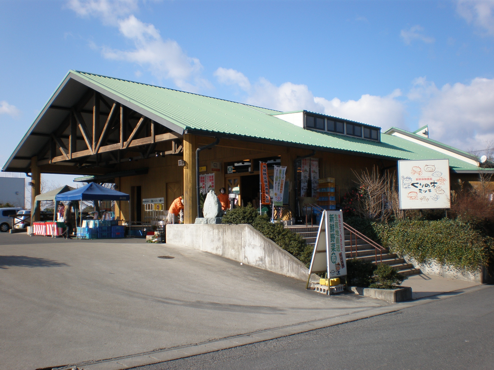 愛知県小牧市にあるくりの木ランチ